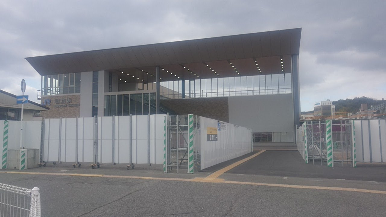 岩国駅東口駅舎